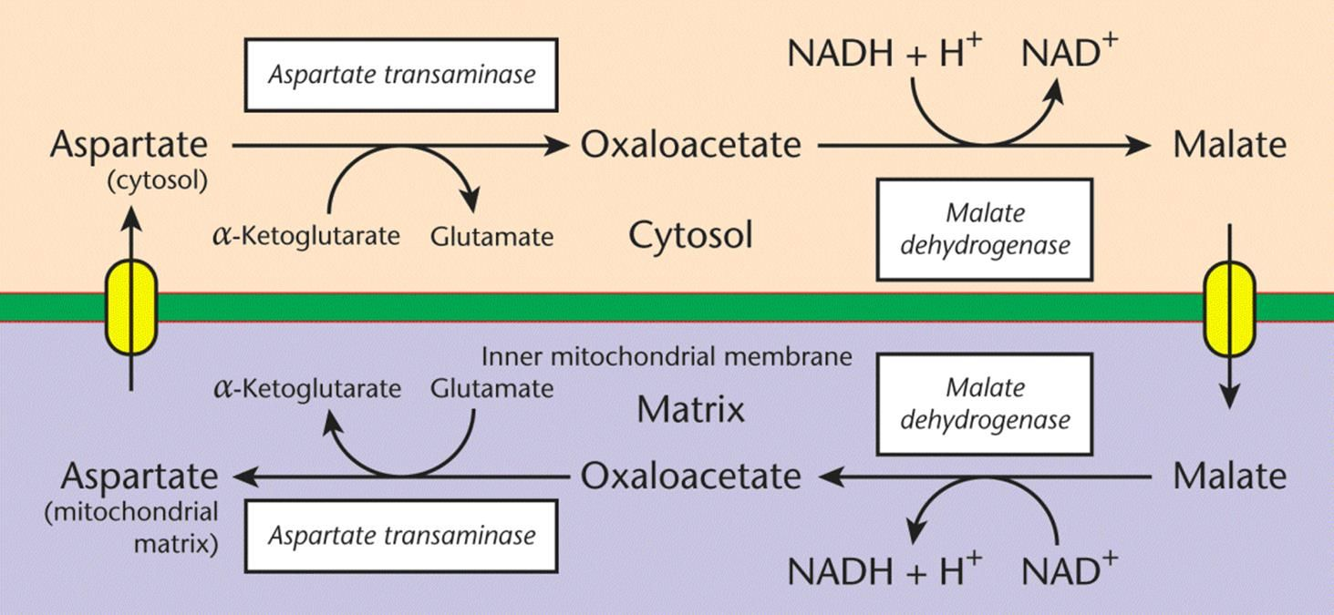 Малат-аспартатна совалка